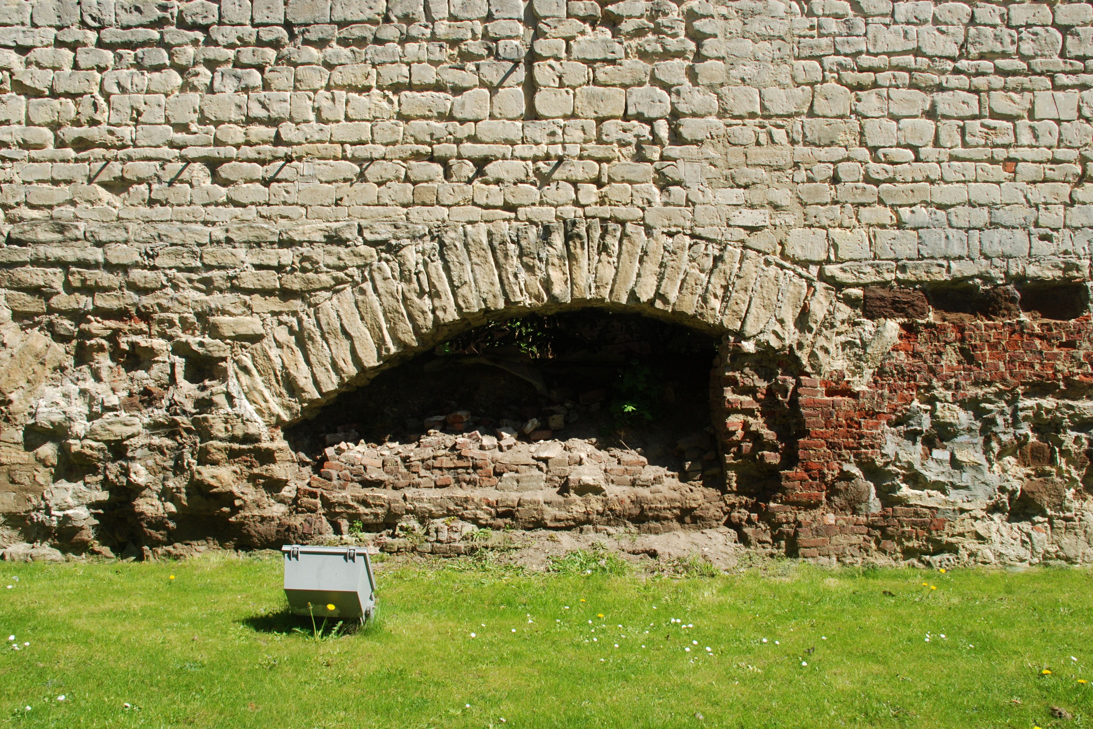 Belgique - Brabant flamand - Louvain - Première enceinte de Louvain - Rue de Redingen